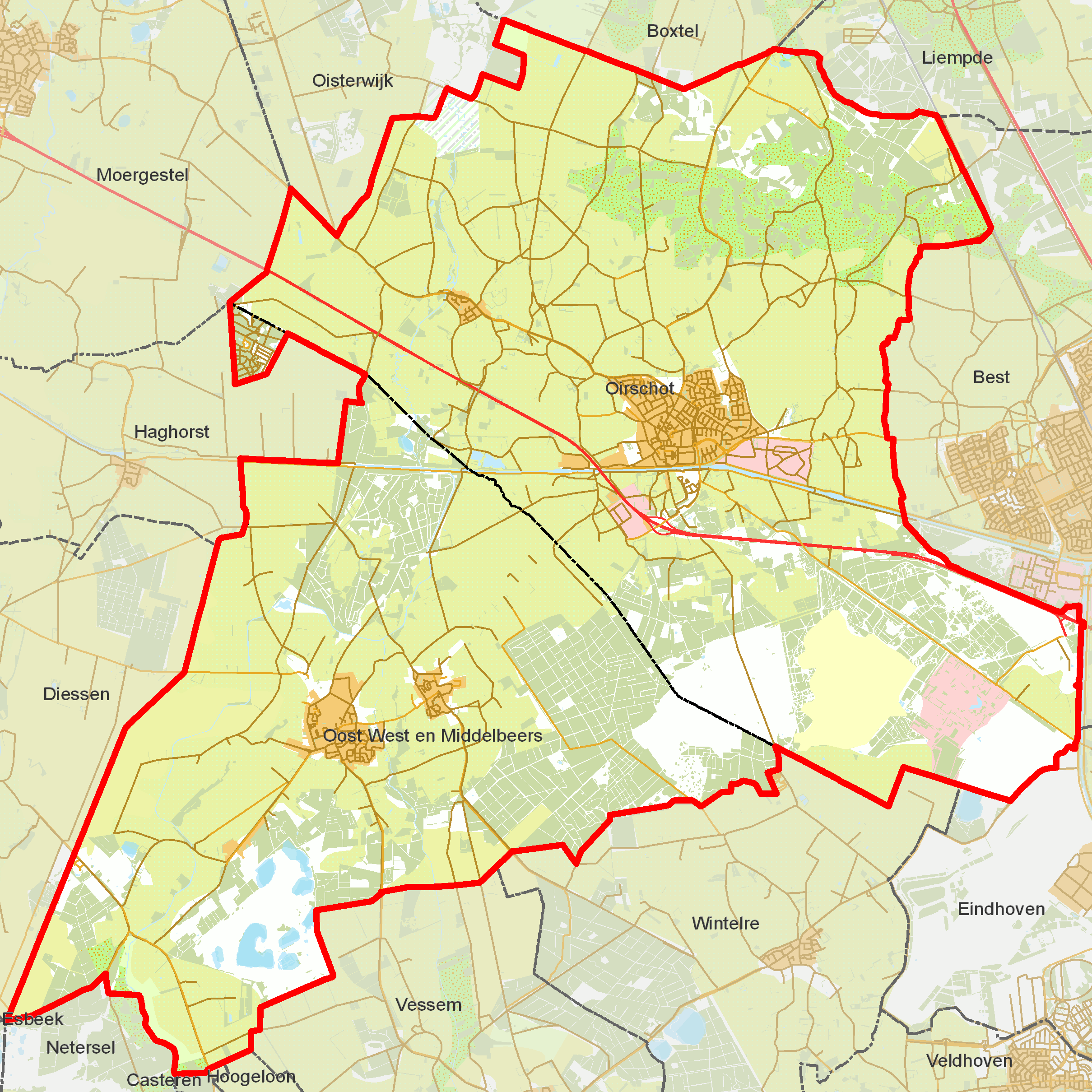 BAG woonplaatsen - Gemeente Oirschot.png